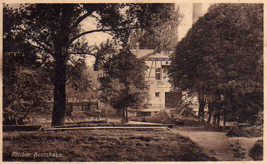 Przystań Raciborskiego Towarzystwa Wioślarskie - wygląd w roku 1913 (wtedy zajmował ją klub Ruderverein Ratibor)